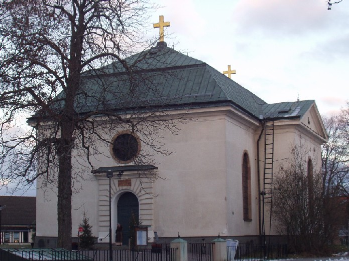 Vaxholms kyrka. Fotograf: Pellaj, februari 2004.